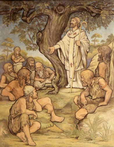 Willehad predigt das Christentum in Drenthe